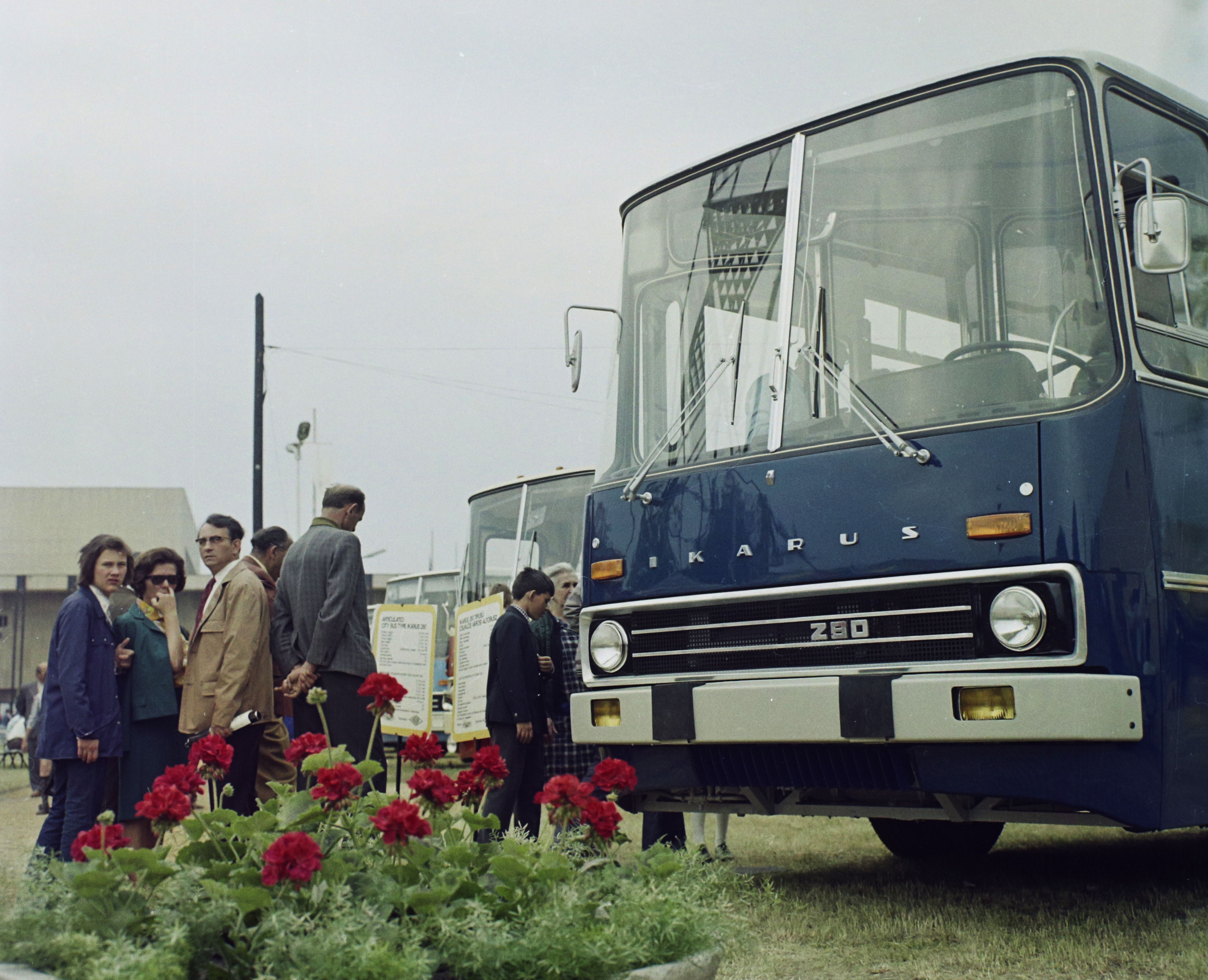 Albertirsai (Dobi István) úti vásárterület.